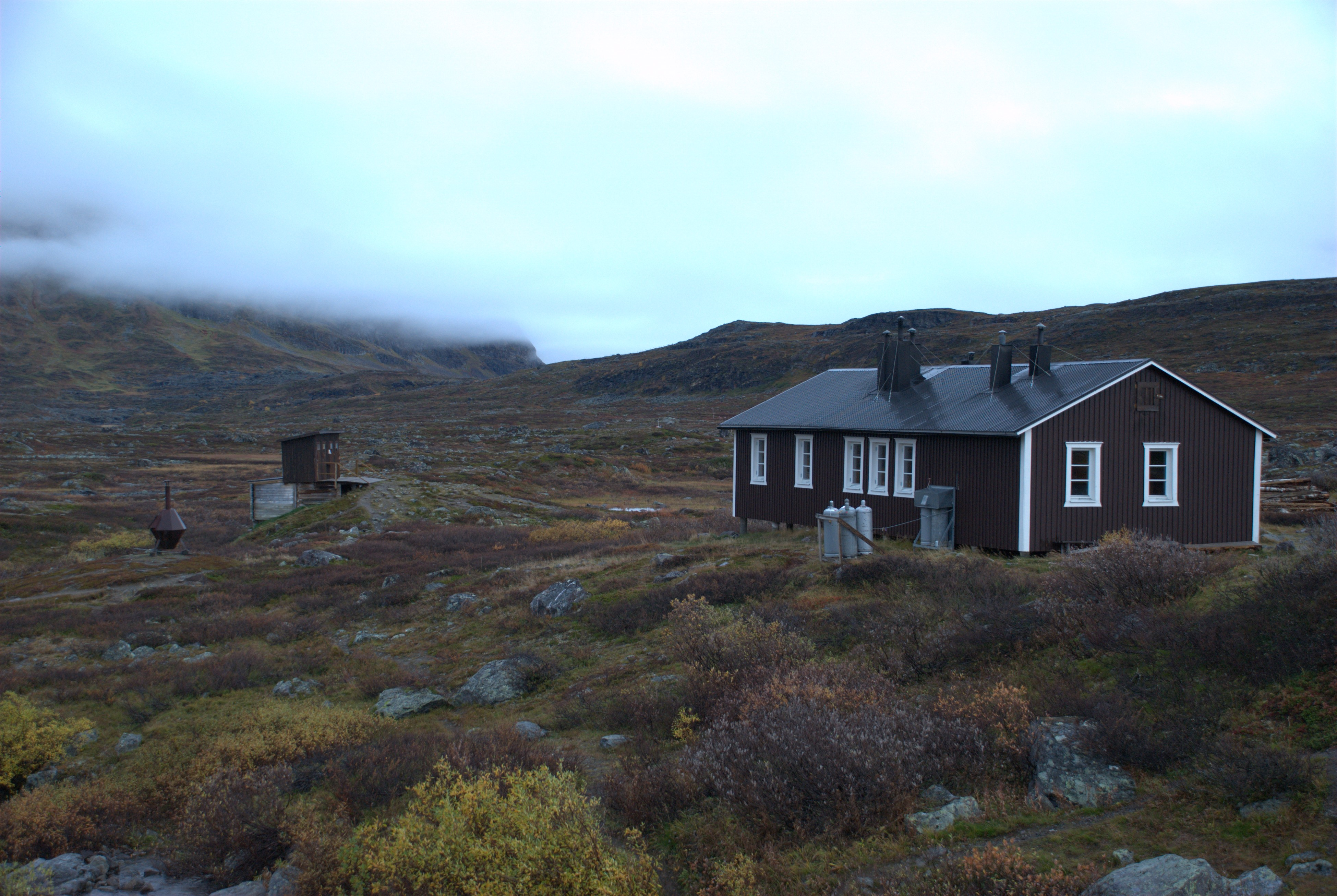 Singistugan